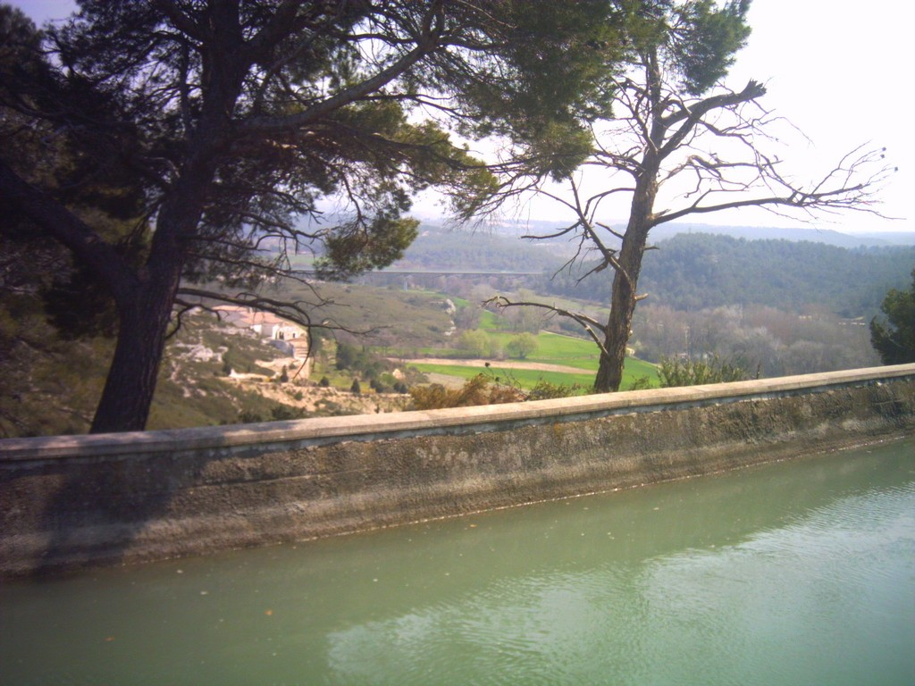 Le canal de Marseille près de Roquefavour. On aperçoit au fond le viaduc TGV de l'Arc.